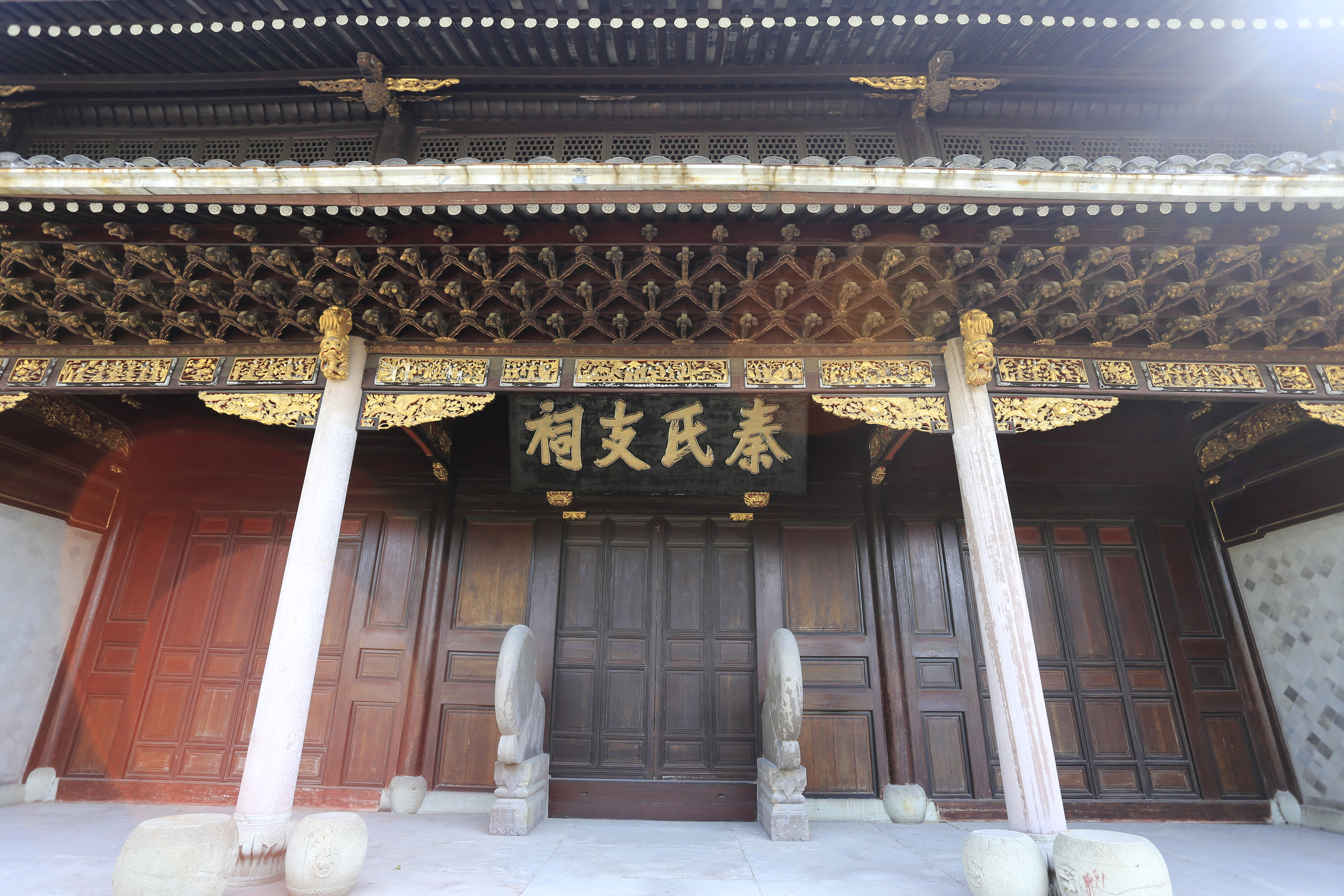 宁波天一阁 —— 秦氏支祠